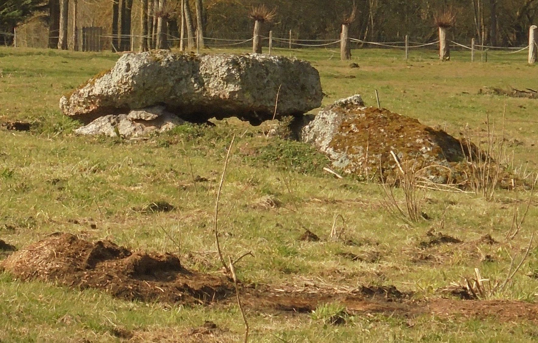 Dolmen dit de la Forge ou de Rugles à Ambenay dans l'Eure